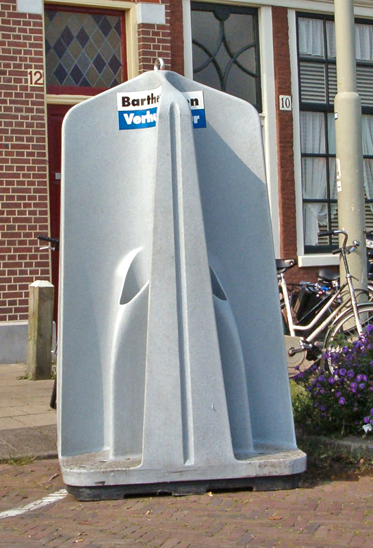 Mobile Pissoir